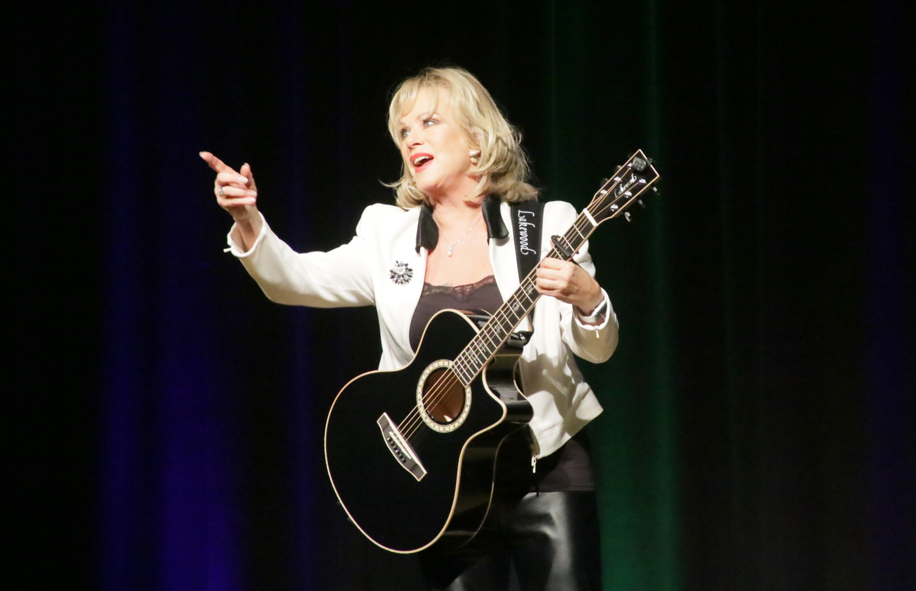 Auftritt Lisa Fitz Bad Griesbach Kurhaus Foto Doris Kessler PNP